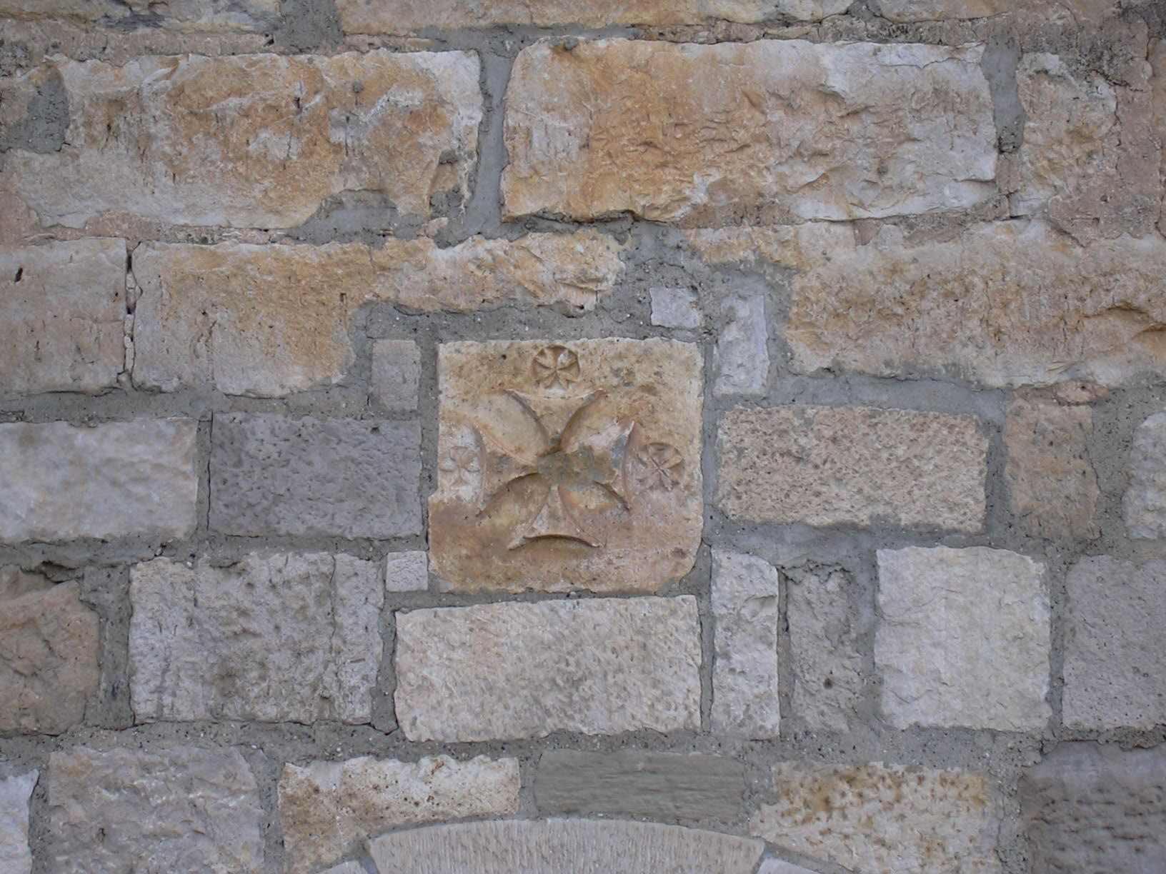 Símbolo templario situado encima del arco de la entrada a la Torre dels Frares en Fraga